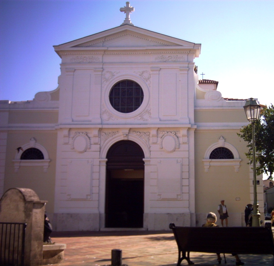 L'église de Saint-Loup, à Marseille (11e arr.)